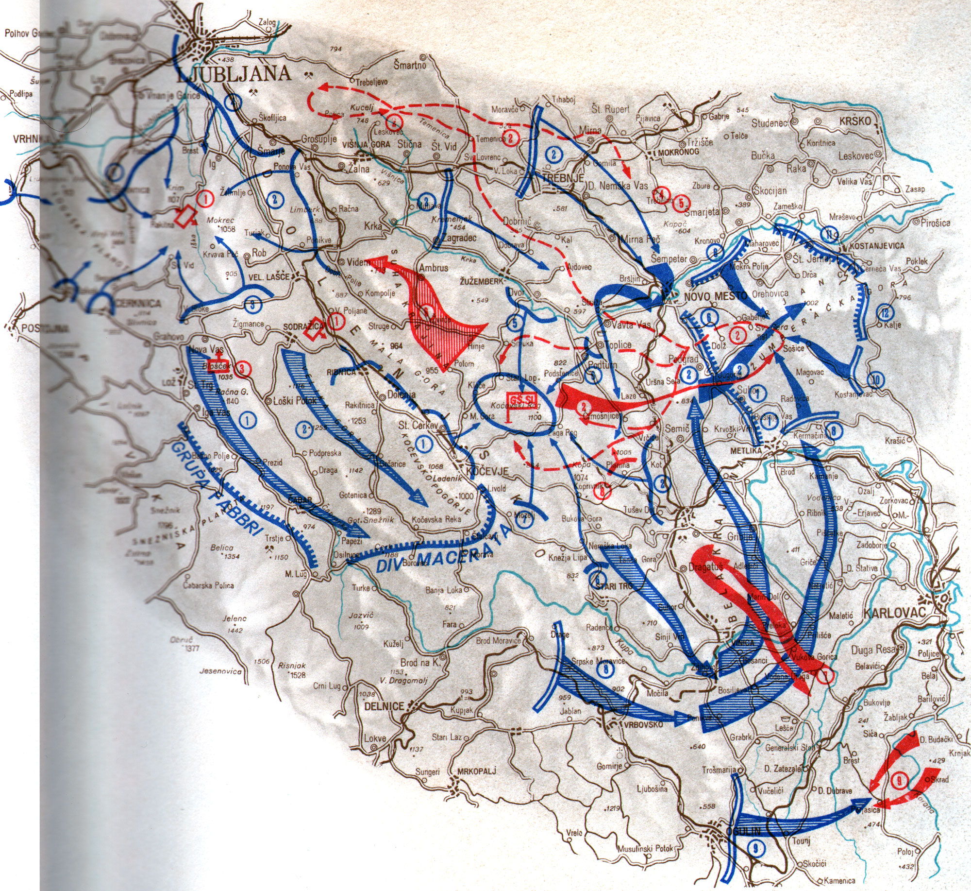 Srpskohrvatski / српскохрватски: Neprijateljska ofanziva u Sloveniji (od 16 jula do 4 novembra 1942 godine)